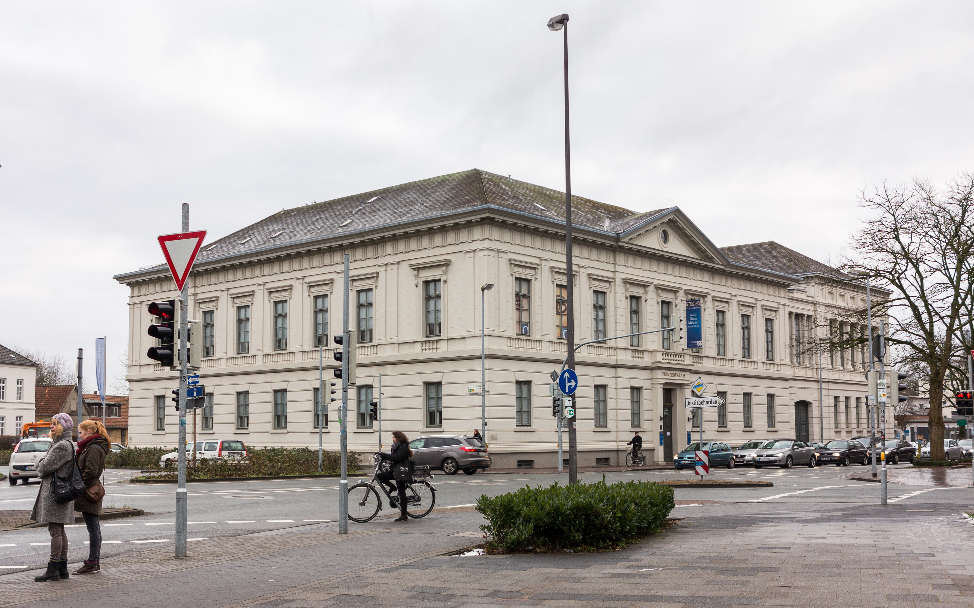 Prinzenpalais in Oldenburg (Oldb). Erbaut im Auftrag von Herzog Peter Friedrich Ludwig 1821-26 und erweitert 1860-62 sowie 1865-67. Architekten: H.C. Slevogt (1821), C. Boos (1860) und H. Strack (1865)